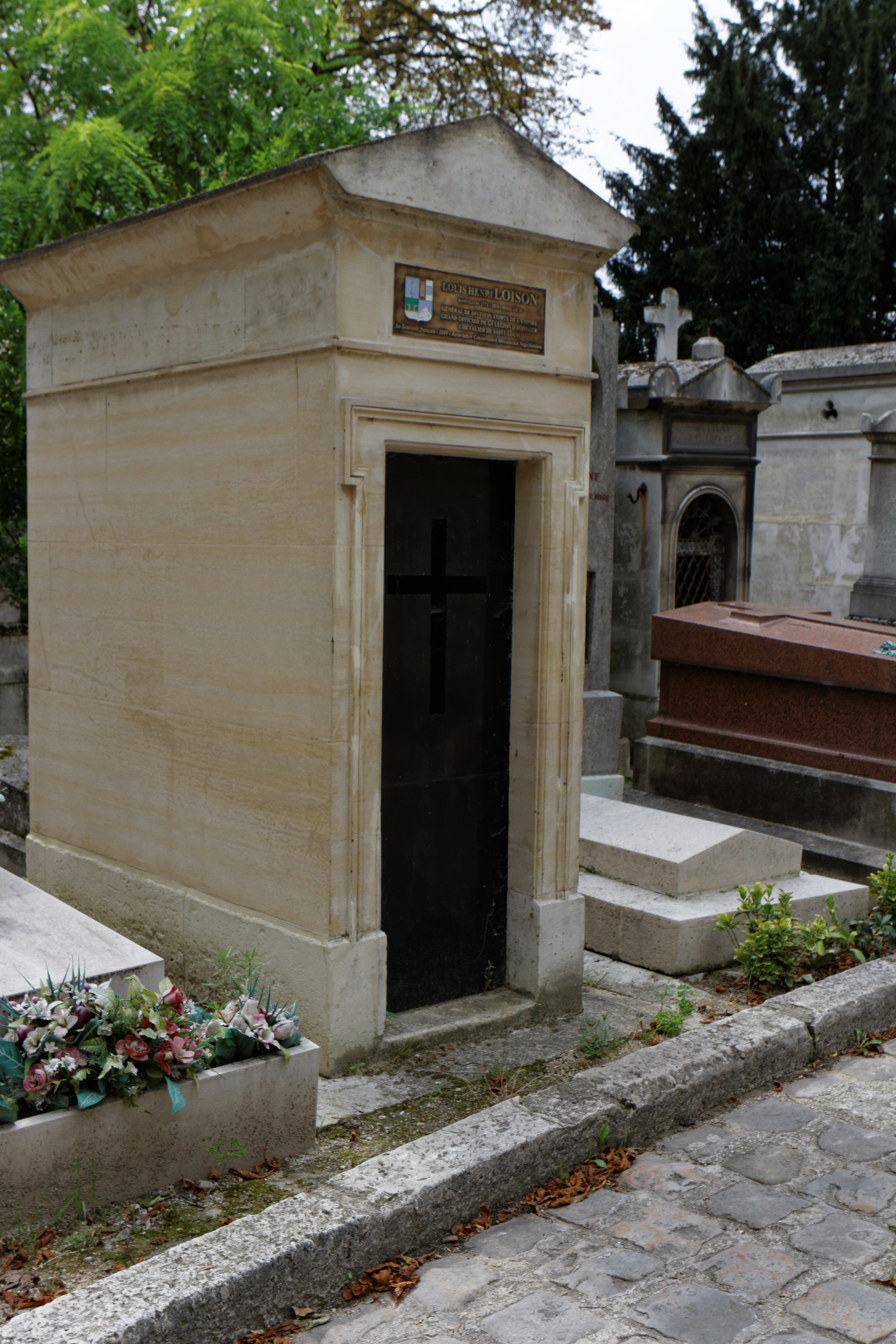 Chapelle funéraire de Louis Henri Loison (1771-1816), général français de la Révolution et de l'Empire.